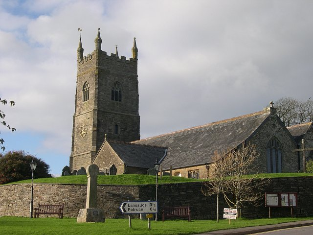 Pelynt Church